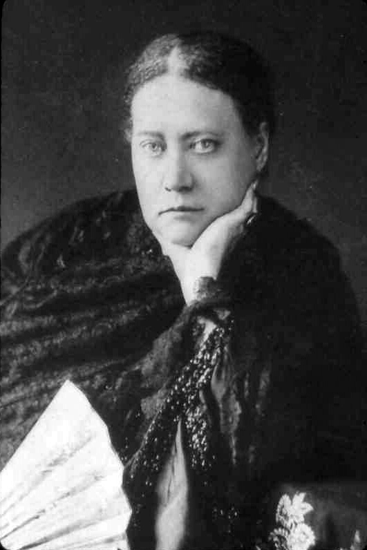 Helena Petrovna Blavatsky (1831-1891), etwa 1876/1878